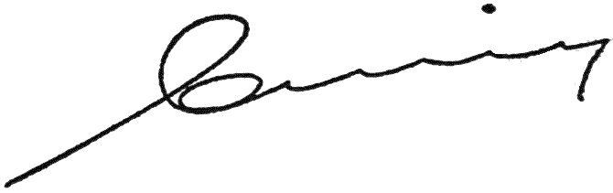 Роспись вице-премьер-министра Украины Владимира Гройсмана